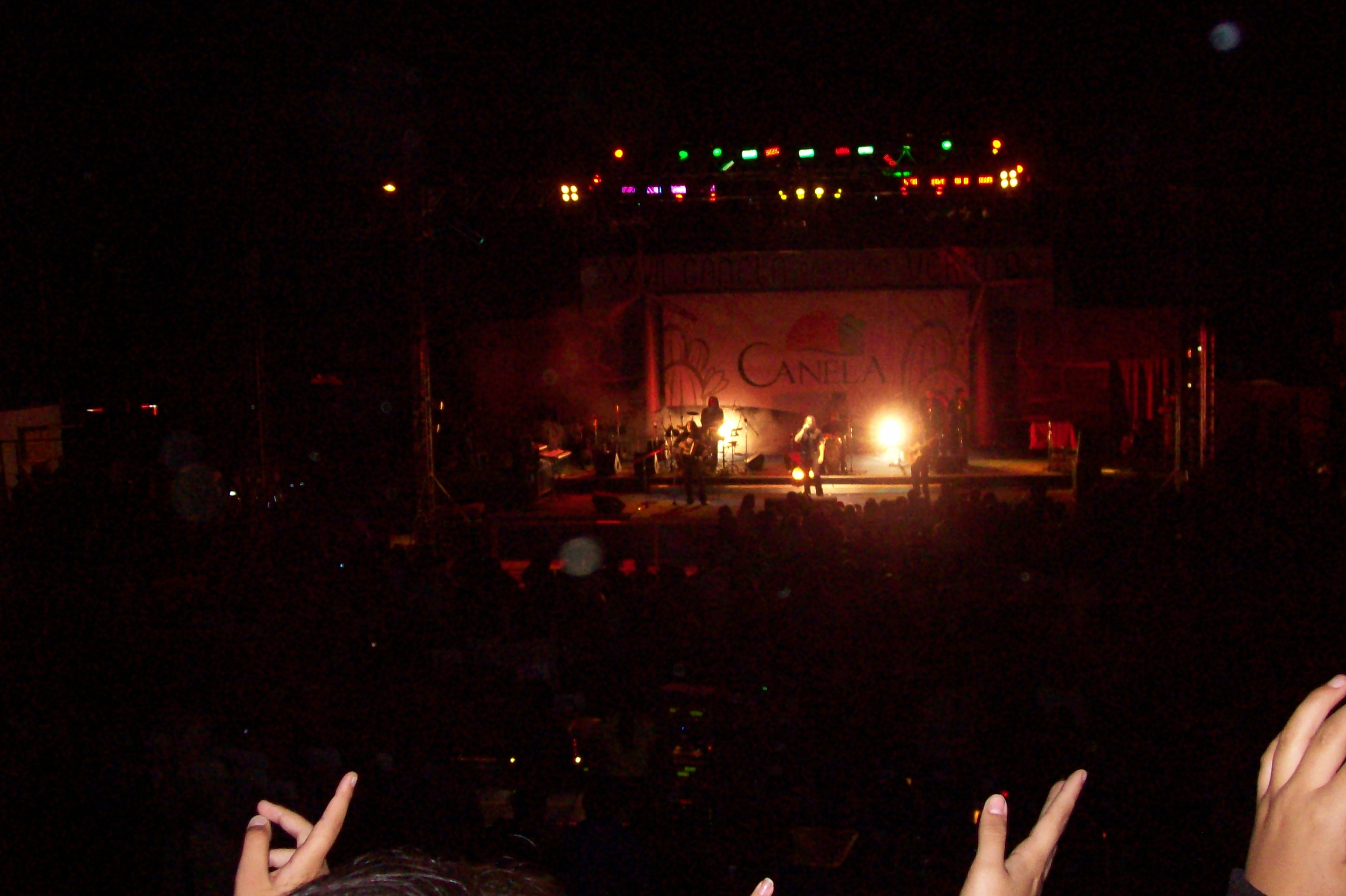 Festival de la cacnción Canela Canta en Verano